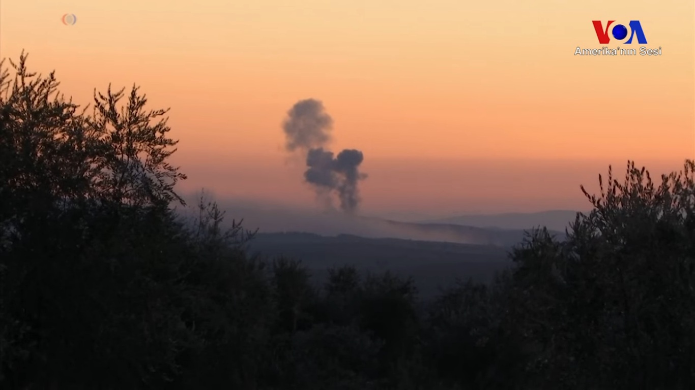 Türkiye, sınır güvenliği gerekçesiyle Fırat Kalkanı Operasyonu ardından bugün de Zeytindalı Operasyonu ile Suriye topraklarında terör örgütleriyle mücadele çerçevesinde Özgür Suriye Ordusu (ÖSO) yapılanmasıyla birlikte askeri harekata başladı.